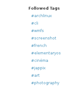 Diaspora : tags suivis